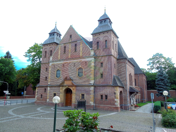 Denkmal Nr. 000001-01